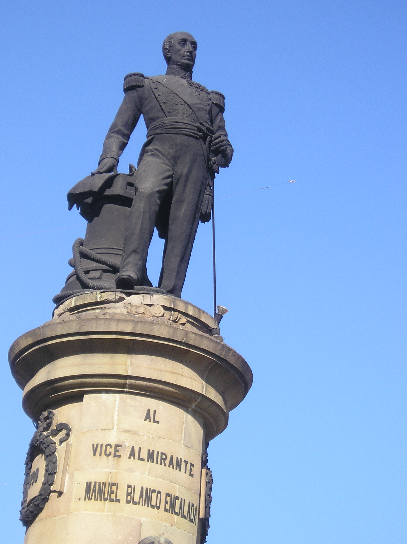 Monumento al Vice-Almirante Manuel Blanco Encalada en la ciudad de Valparaíso, Chile. Obtenida por Valo